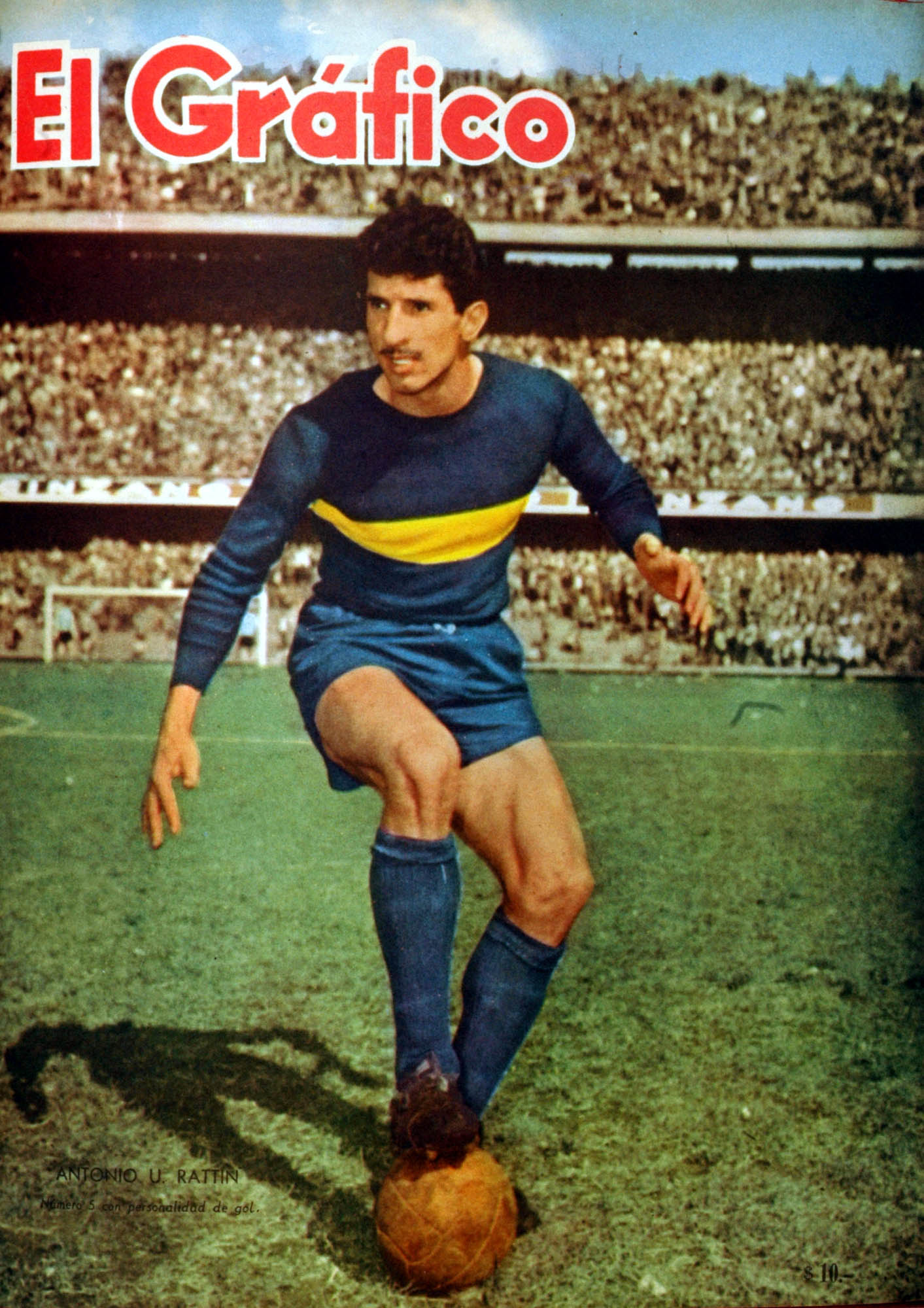 El Grafico del 26 de Octubre de 1960. Edicion 2144